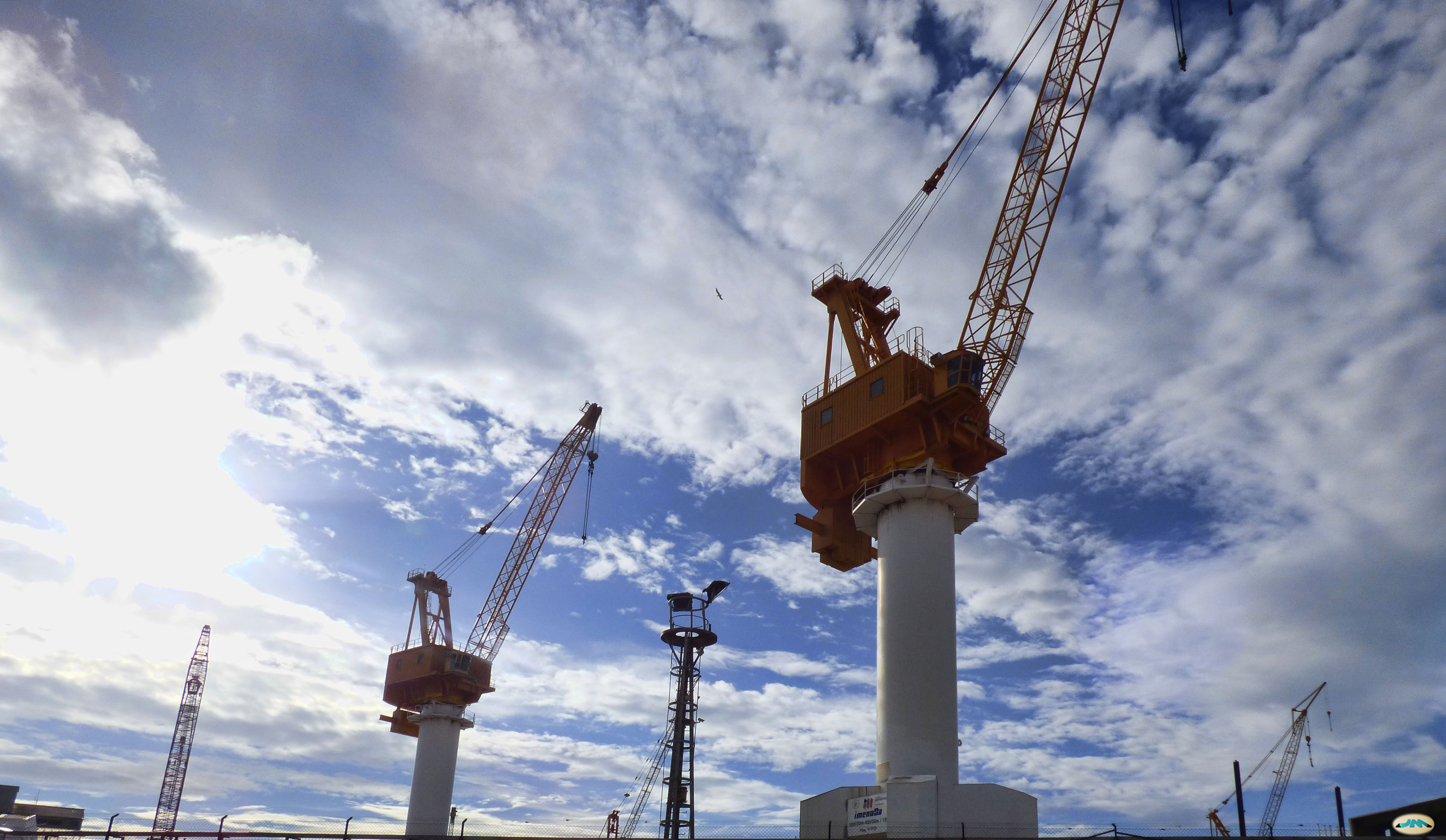 Desde el puesto de copiloto.